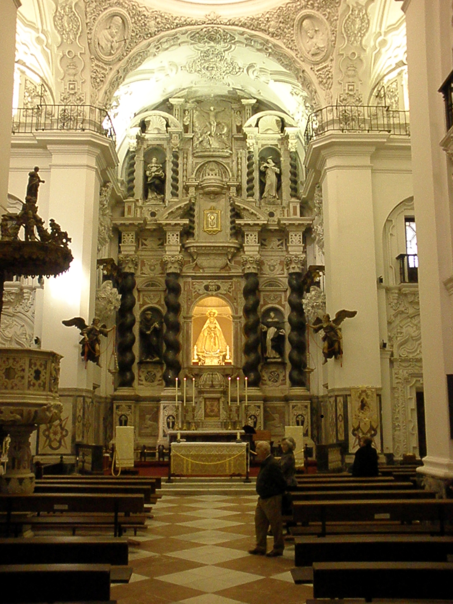 Interior de la Iglesia de Santo Domingo, Cádiz, España.